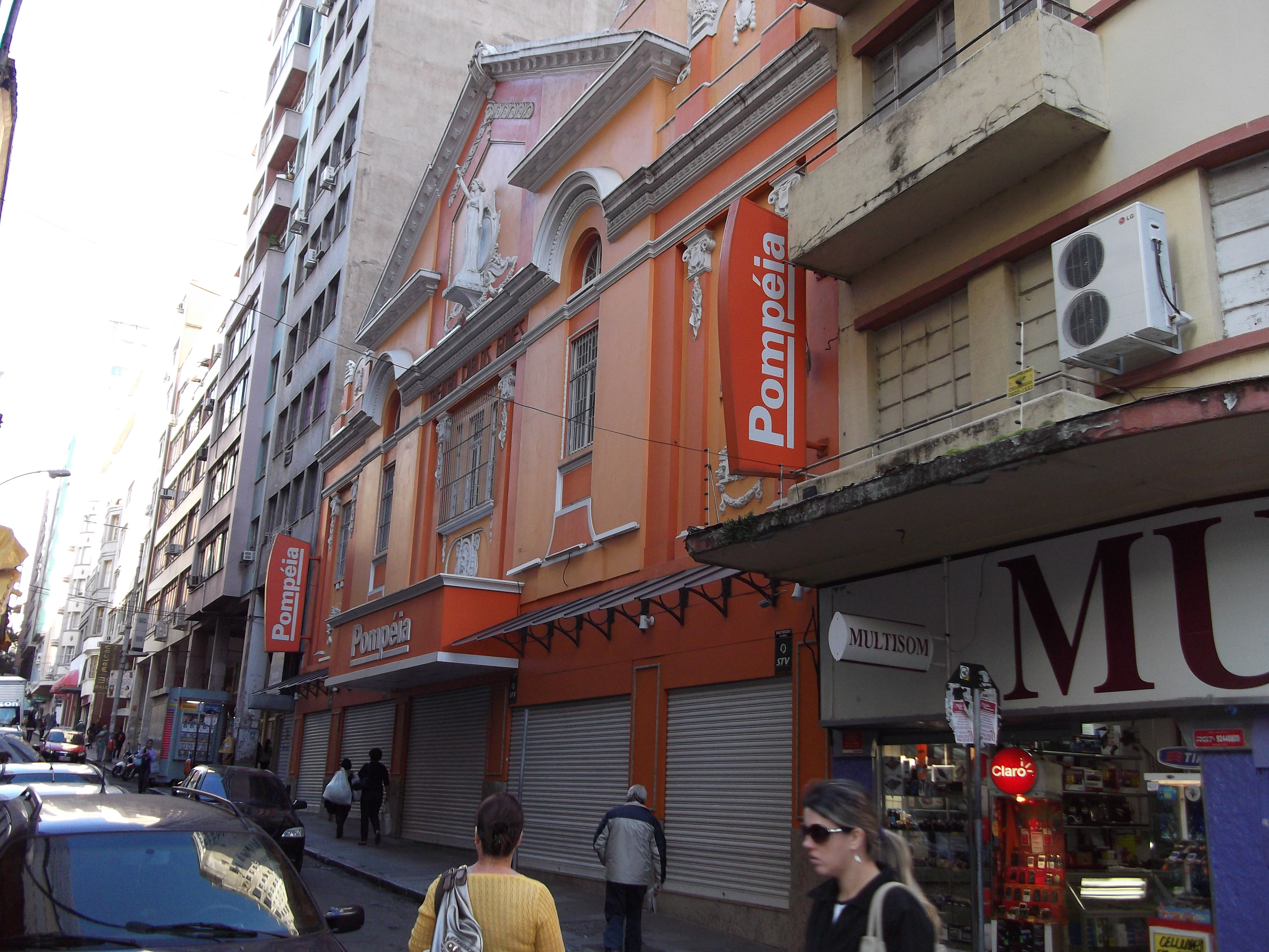 Theatro Carlos Gomes (Porto Alegre, Brasil)